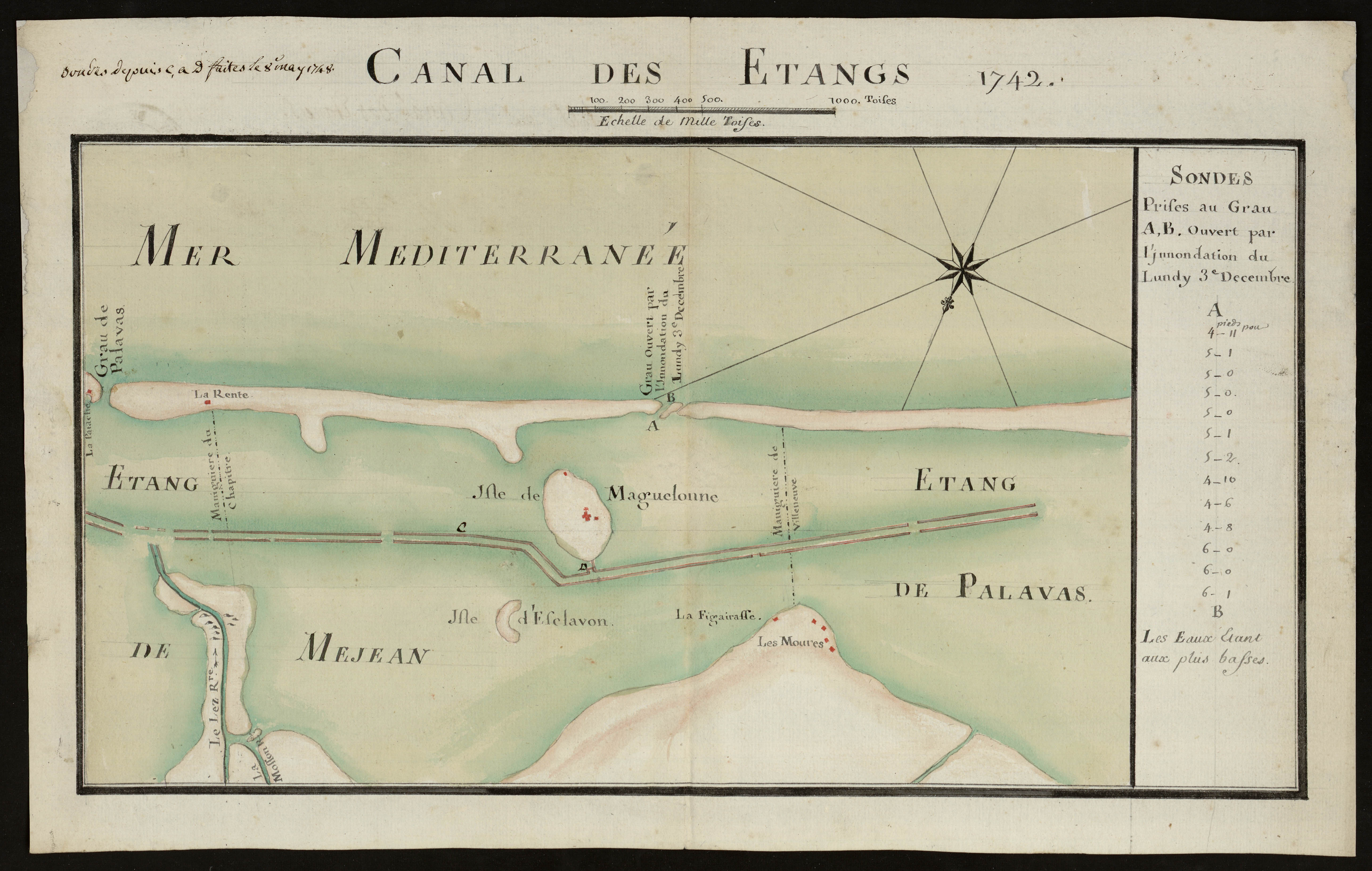 Villeneuve-lès-Maguelone. - Plan du projet de canal des étangs de Palavas et de Méjean